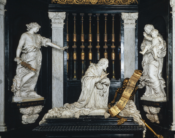 Sint-Baafskathedraal, Gent Jean Del Cour, Praalgraf van Eugenius Albertus d'Allamont, 1667-1670; inv nr: 240